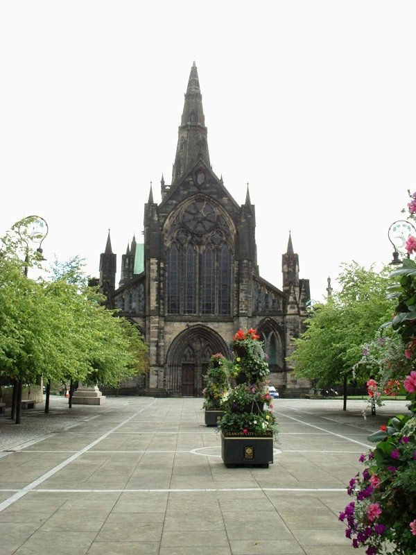 Glasgow Cathedral